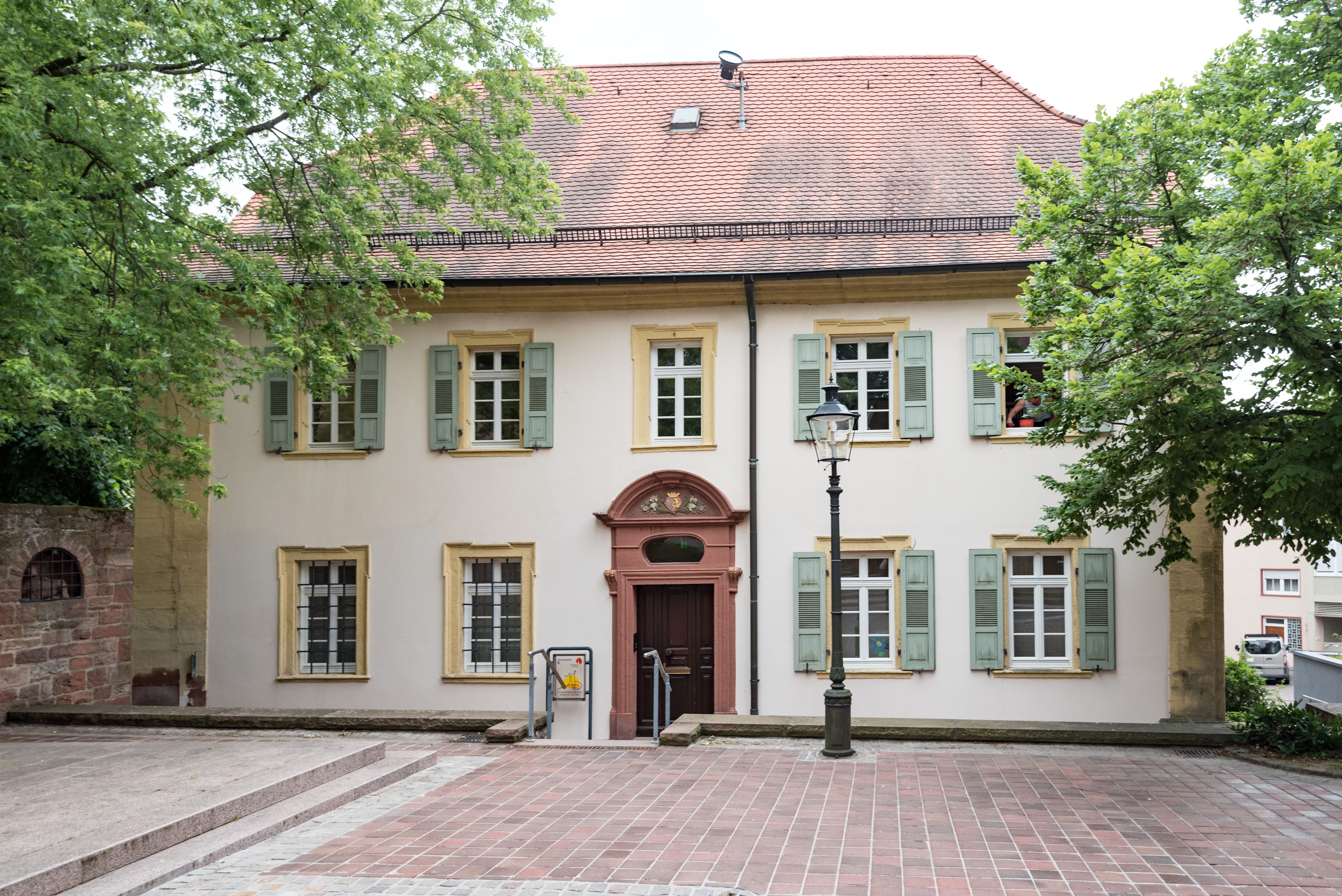 Buchen (Odenwald), Wimpinaplatz 6, Altes Pfarrhaus